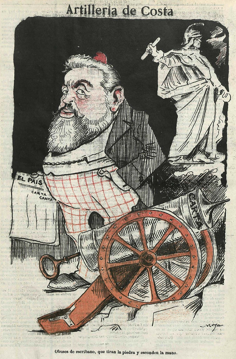 Artillería de Costa, en la revista satírica española Gedeón.